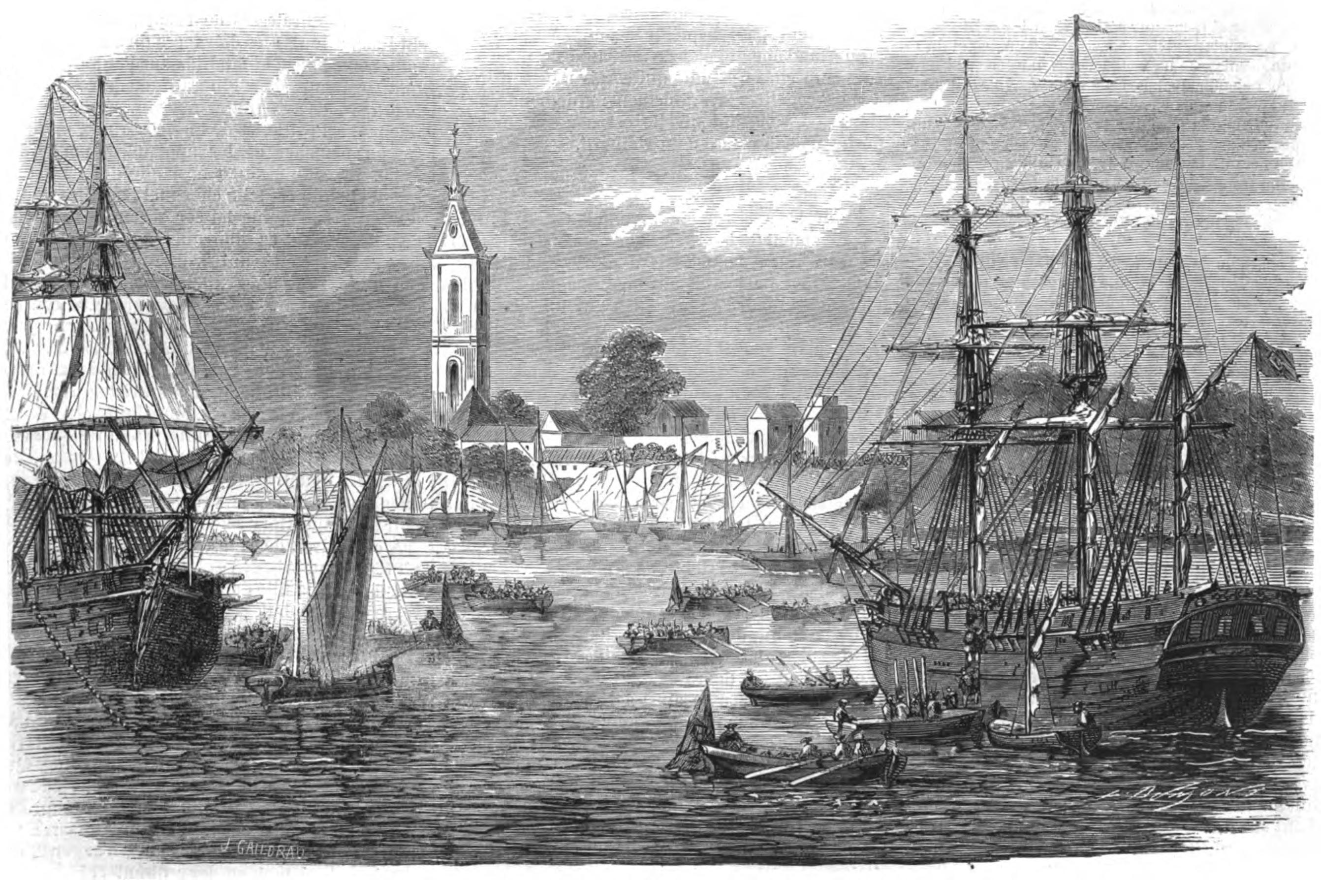 Arrivée des renforts brésiliens à Corrientes (Parana) pour l'armée d'opération. - D'après les croquis envoyés par M. Paranhos Junior.